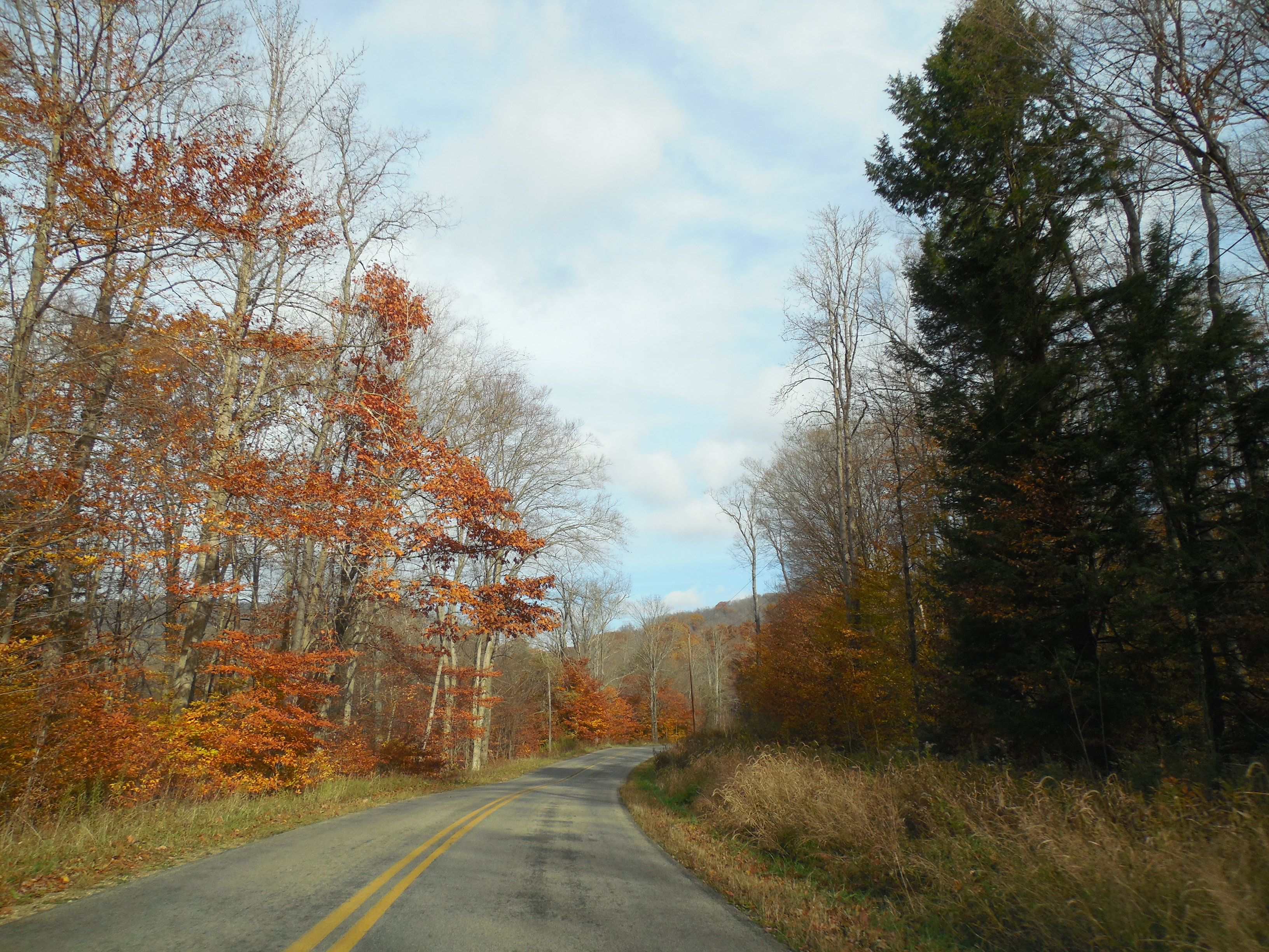 Pennsylvania Route 666